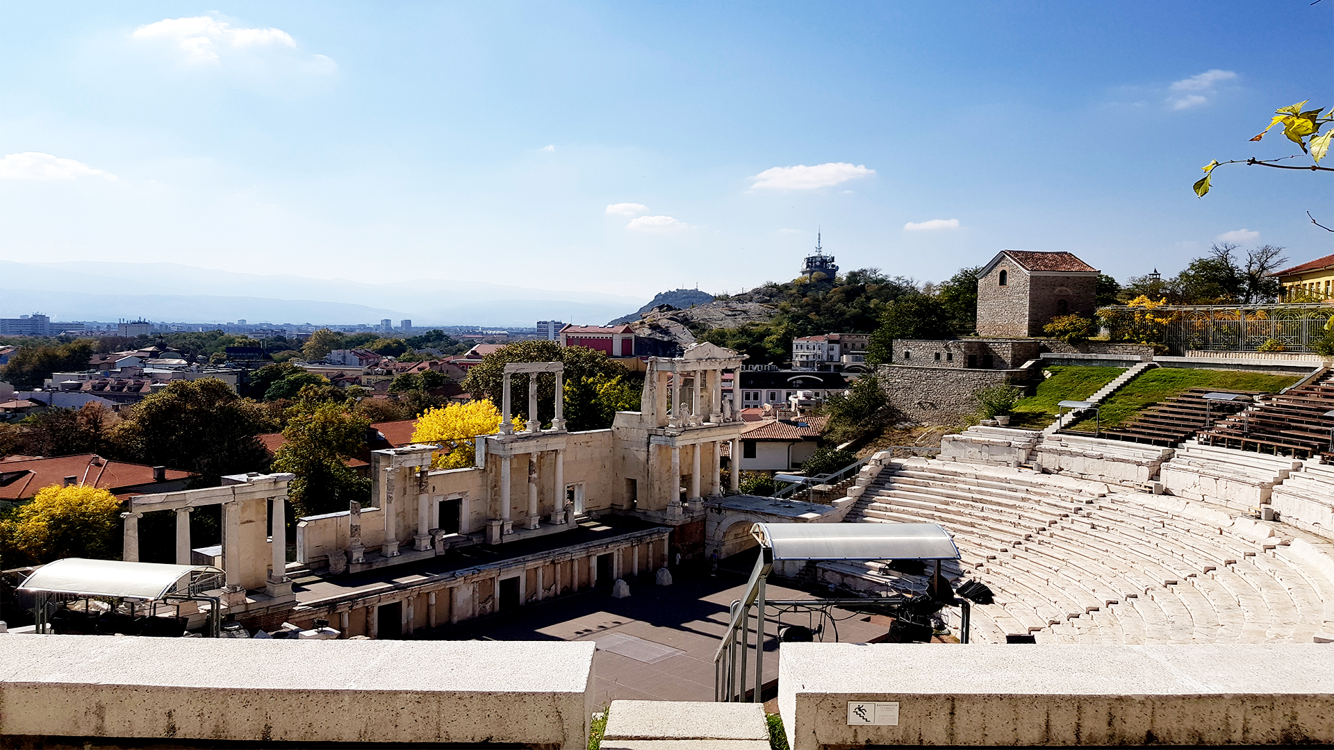 В Пловдив това безпорно е един от най-ценните паметници на богатото археологическо наследство на древния град.